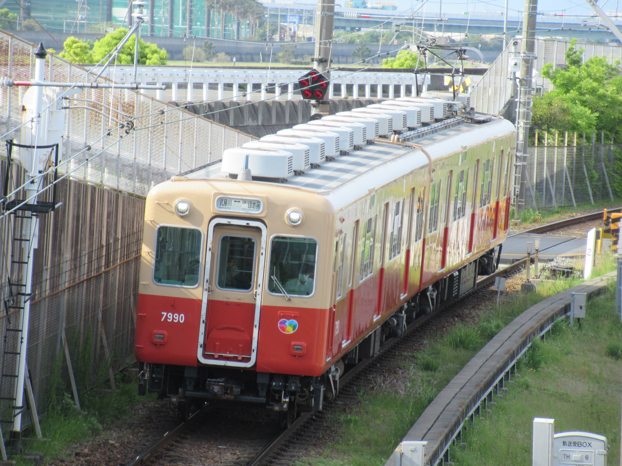 武庫川線 洲先ｰ東鳴尾間を走る7990F